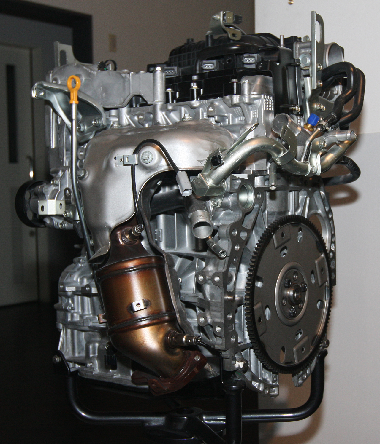 2001 Nissan QR25DE engine. L4 2,488cc